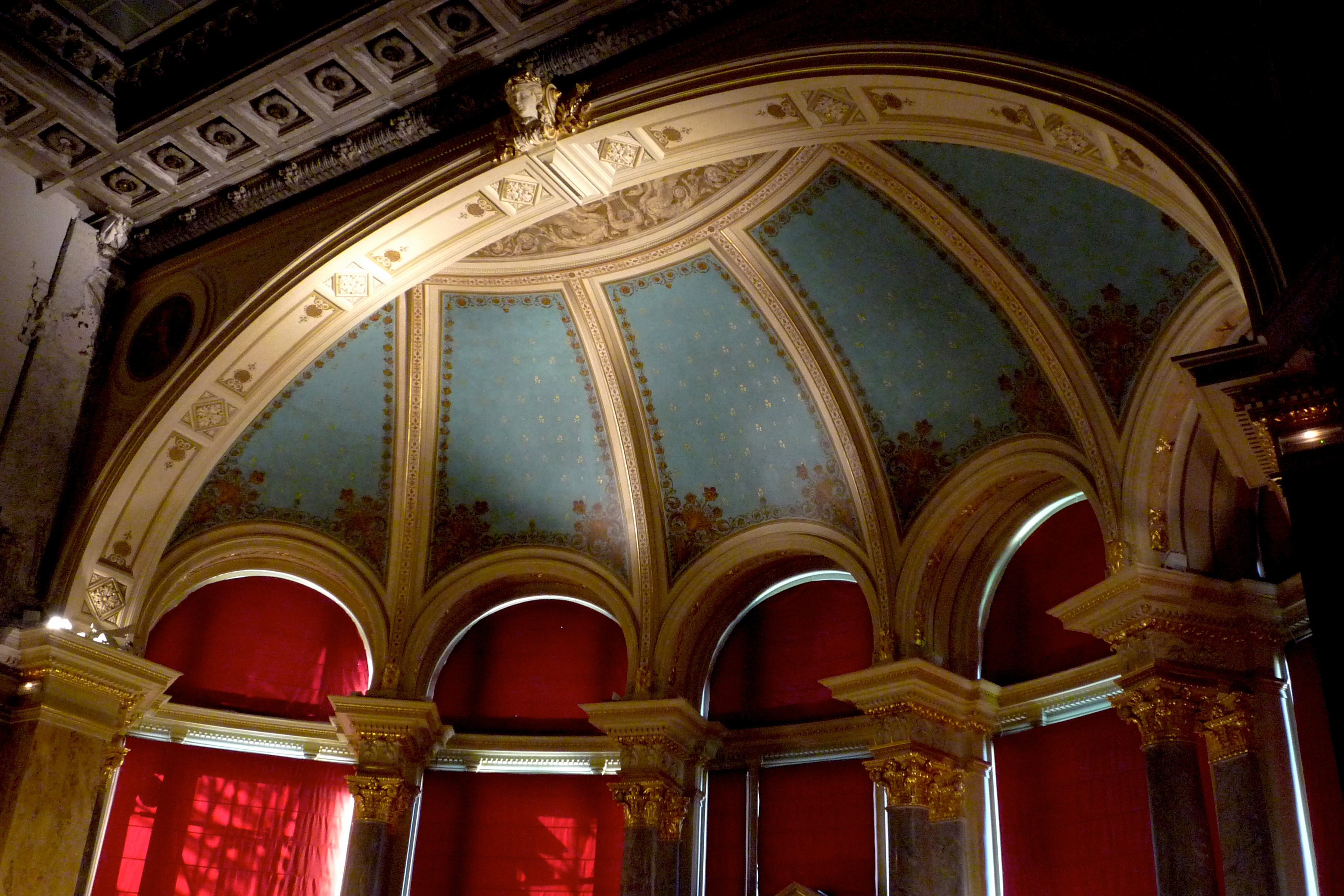 Strasbourg, Palais du Rhin, la salle des fêtes